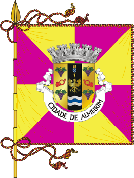 Flag of Almeirim municipality (Portugal) * Author: Sérgio Horta The author has agreed to usage of his works under the GNU-FDL, as long as he is quoted as the source: :Caro Senhor, :Gostaria de saber se os brasões que tem no seu site estão no domínio público ou se estão protegidos por direitos de autor. Estou a participar na WIkipédia em português e gostaria de ilustrar os artigos sobre freguesias potuguesas com brasões como os que tem no seu site. Se estiver de acordo com essa utilização, deve estar informado que qualquer pessoa poderá ter acesso às imagens utilizando-as para qualquer fim legal, incluindo fins comerciais. Se estiver de acordo em colocar as imagens no domínio público, agradecia que me contactasse. Obrigado. :Manuel Anastácio ::Olá, as imagens que estão no meu site são de livre utilização, só gostaria que, se os usassem no vosso site, indicassem a página de origem dos mesmos. Cumprimentos Sérgio Horta